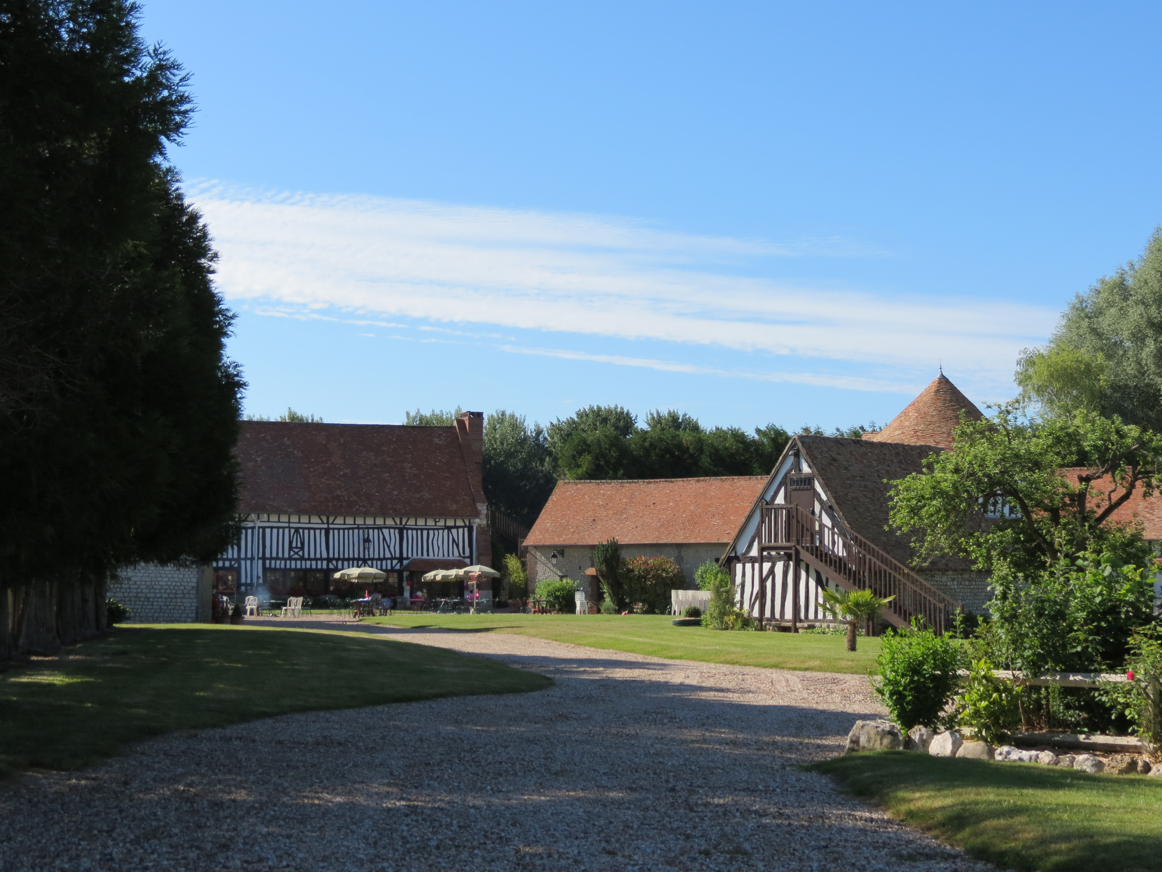 Ferme de Port-Pinché